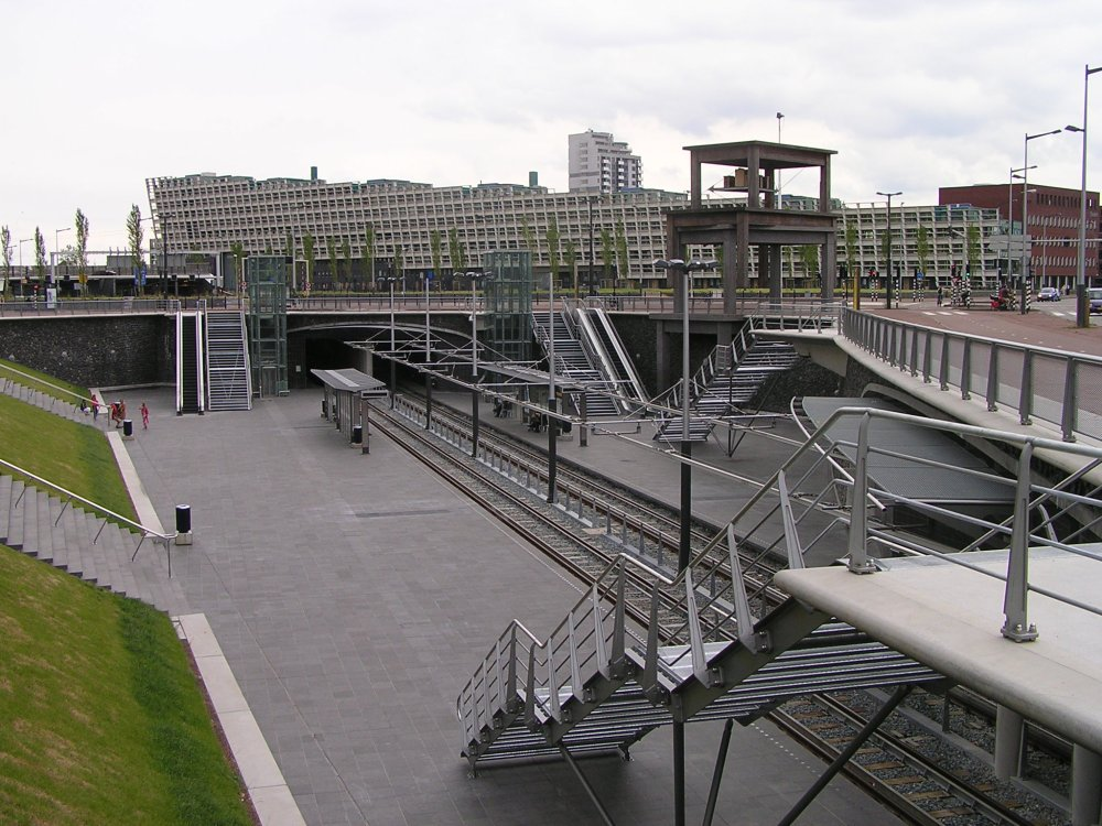 De verdiept gelegen tramhalte in het Rietlandpark. De gestapelde houten tafels in de rechterhoek zijn een kunstwerk. Op de hangende plank onder de bovenste tafel staan enkele bijenkorven. Eigen foto, juni 2005.